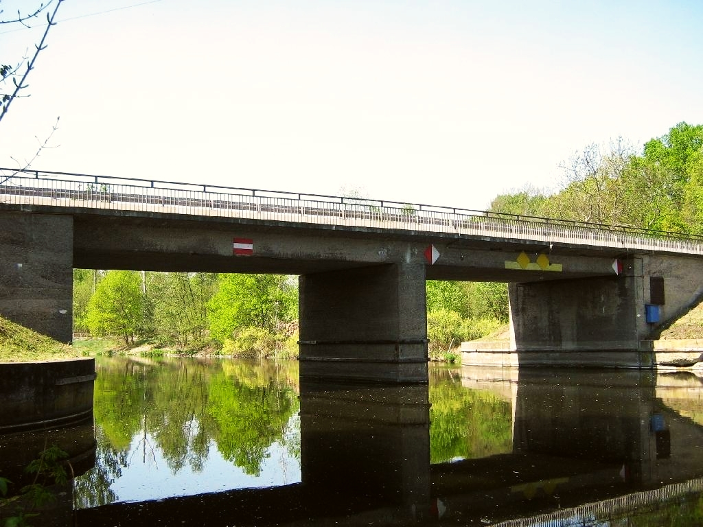 Straßenbrücke Forsthaus Alt-Brieselang über den Havelkanal bei Alt Brieselang (Brandenburg).